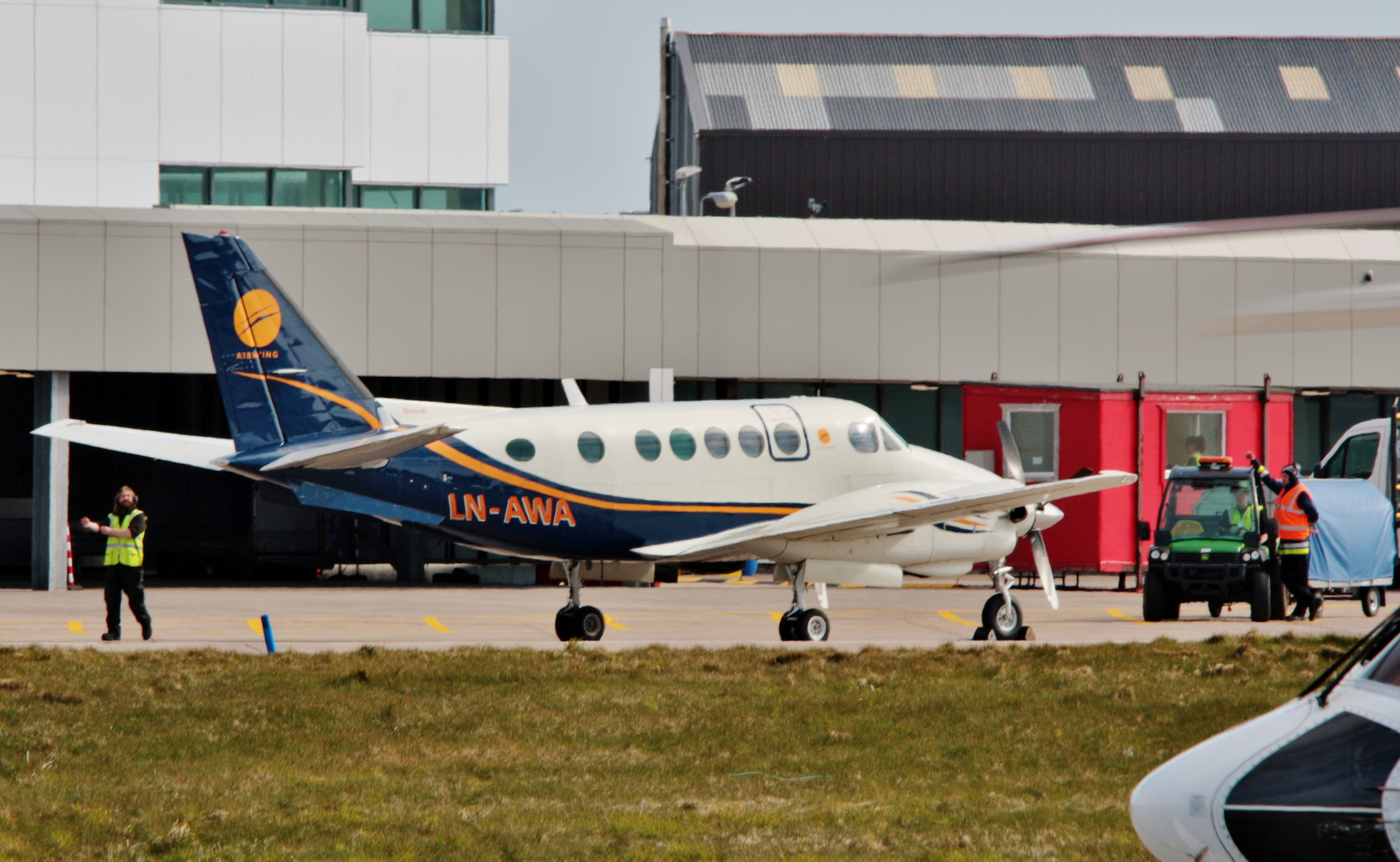 Parked at Sumburgh